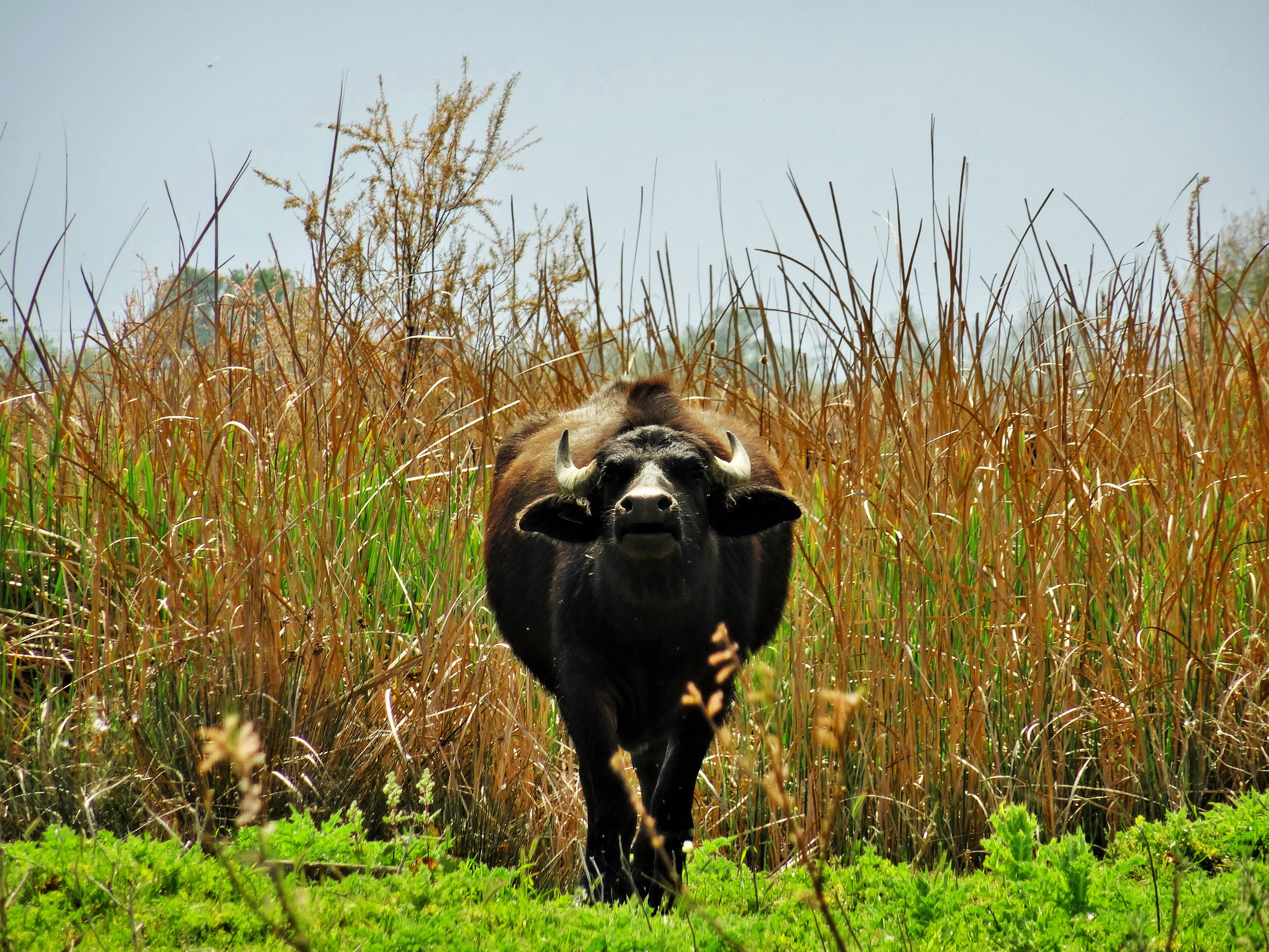 Βουβάλος/Νεροβούβαλος/Δέλτα Αξιού/Εθνικό Πάρκο This is a photography of Natura 2000 protected area with ID GR1220002